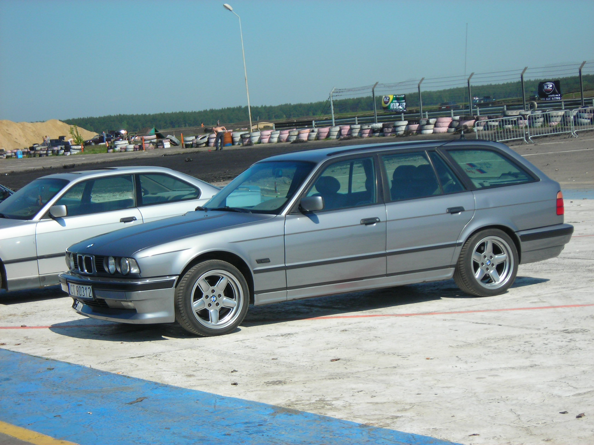 BMW 5 e34 Touring, spoiler przedni i felgi Ac Schnitzer.